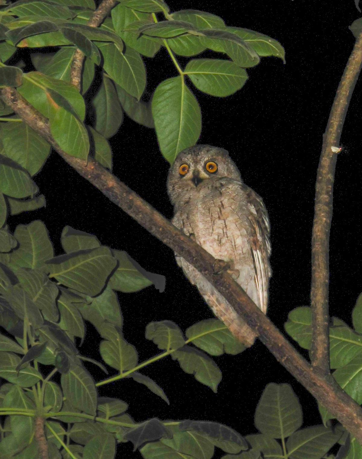 Сова на ветке дерева